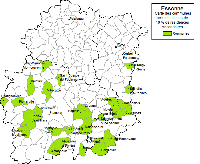 Carte des communes de l'Essonne (91) ayant plus de 10 % de résidences secondaires en 2006.